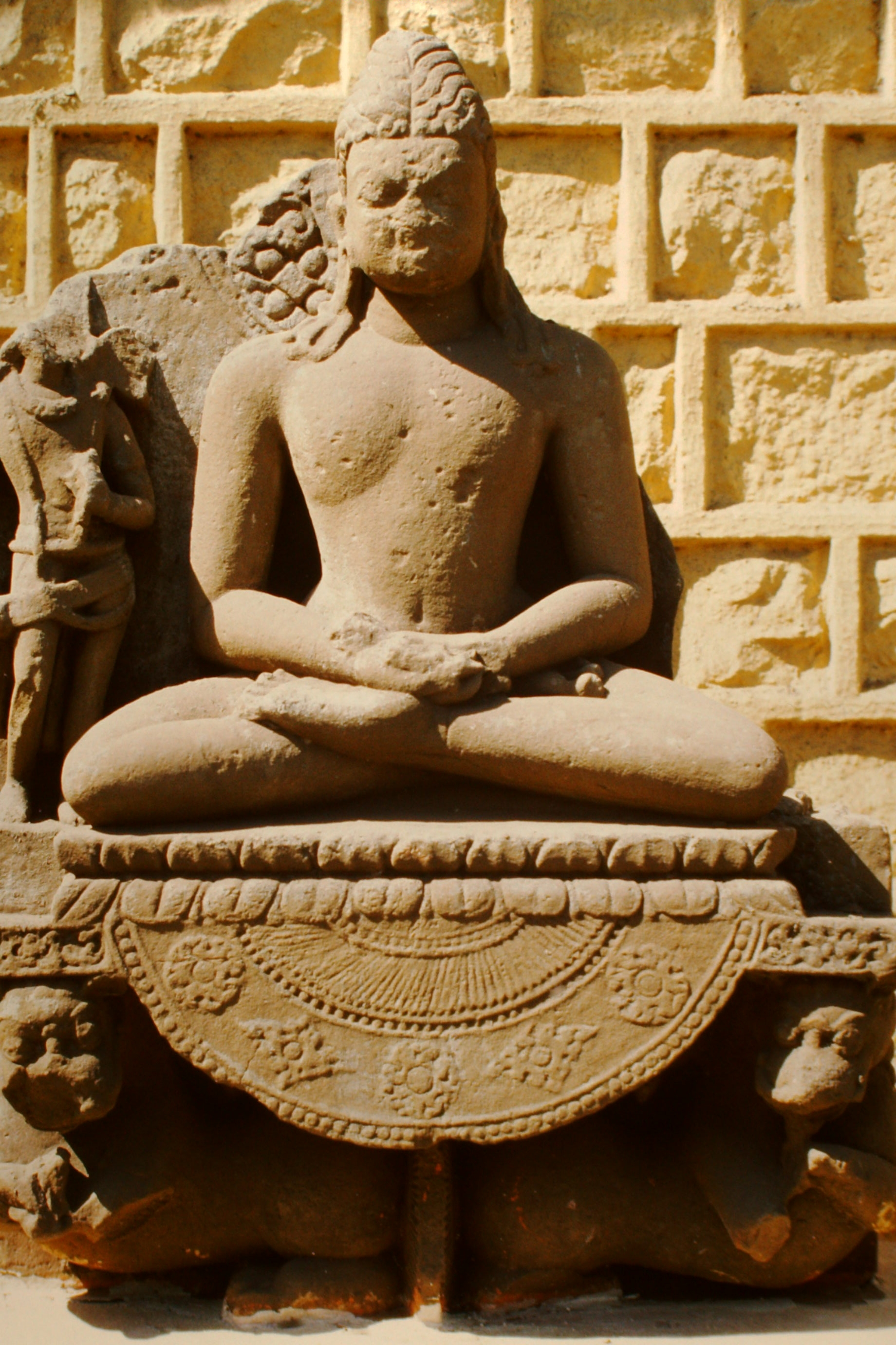 Sanchi, Stupa Nr. 1 (Buddhafigur)